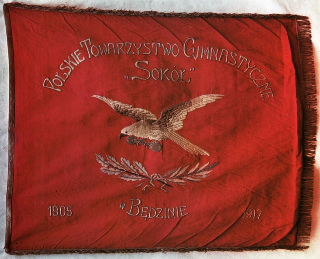 Sztandar polskiego Towarzystwa Gimnastycznego "Sokół" w Będzinie.